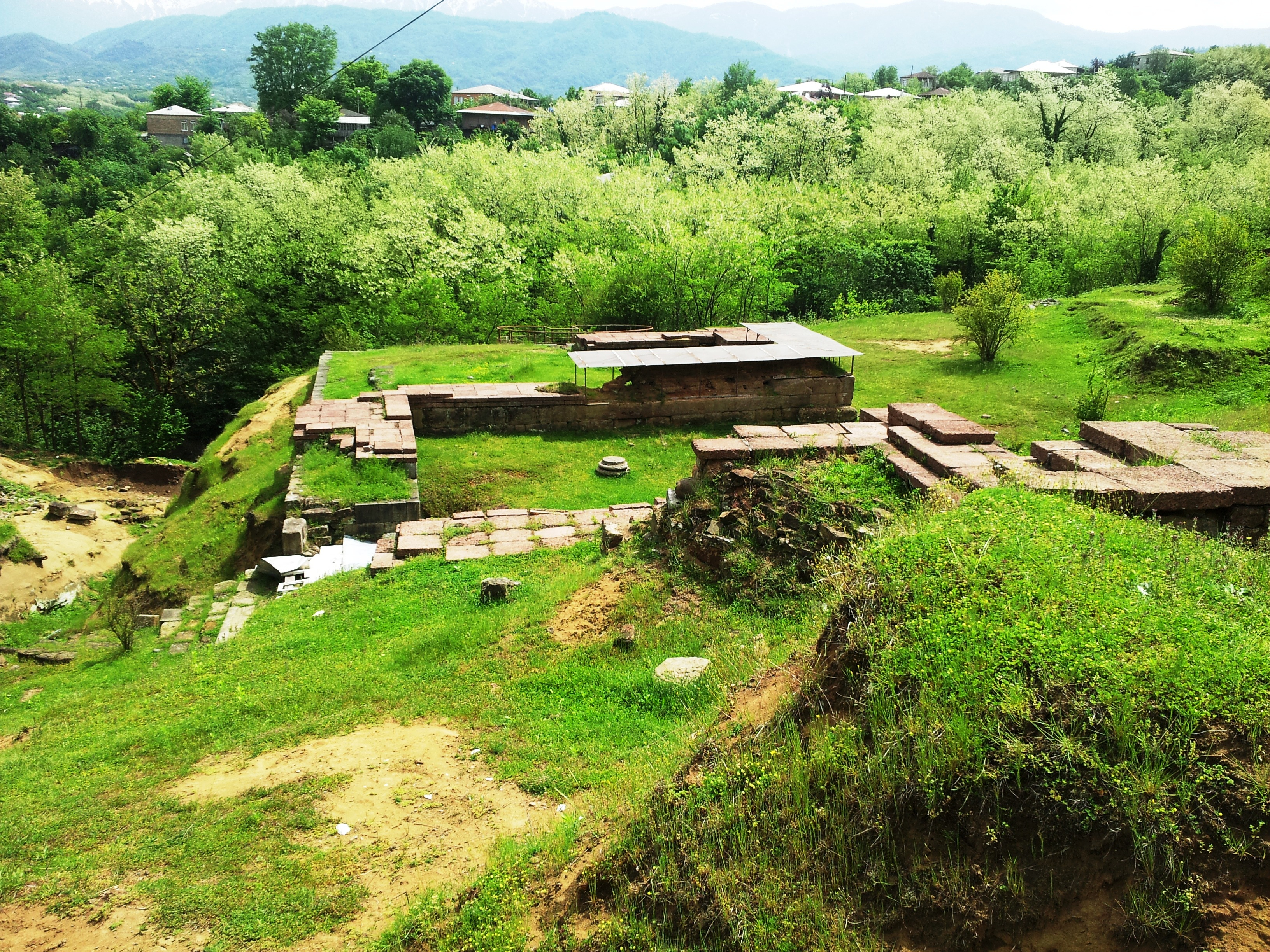 ვანი, ისტორიული ქალაქის ნანგრევები